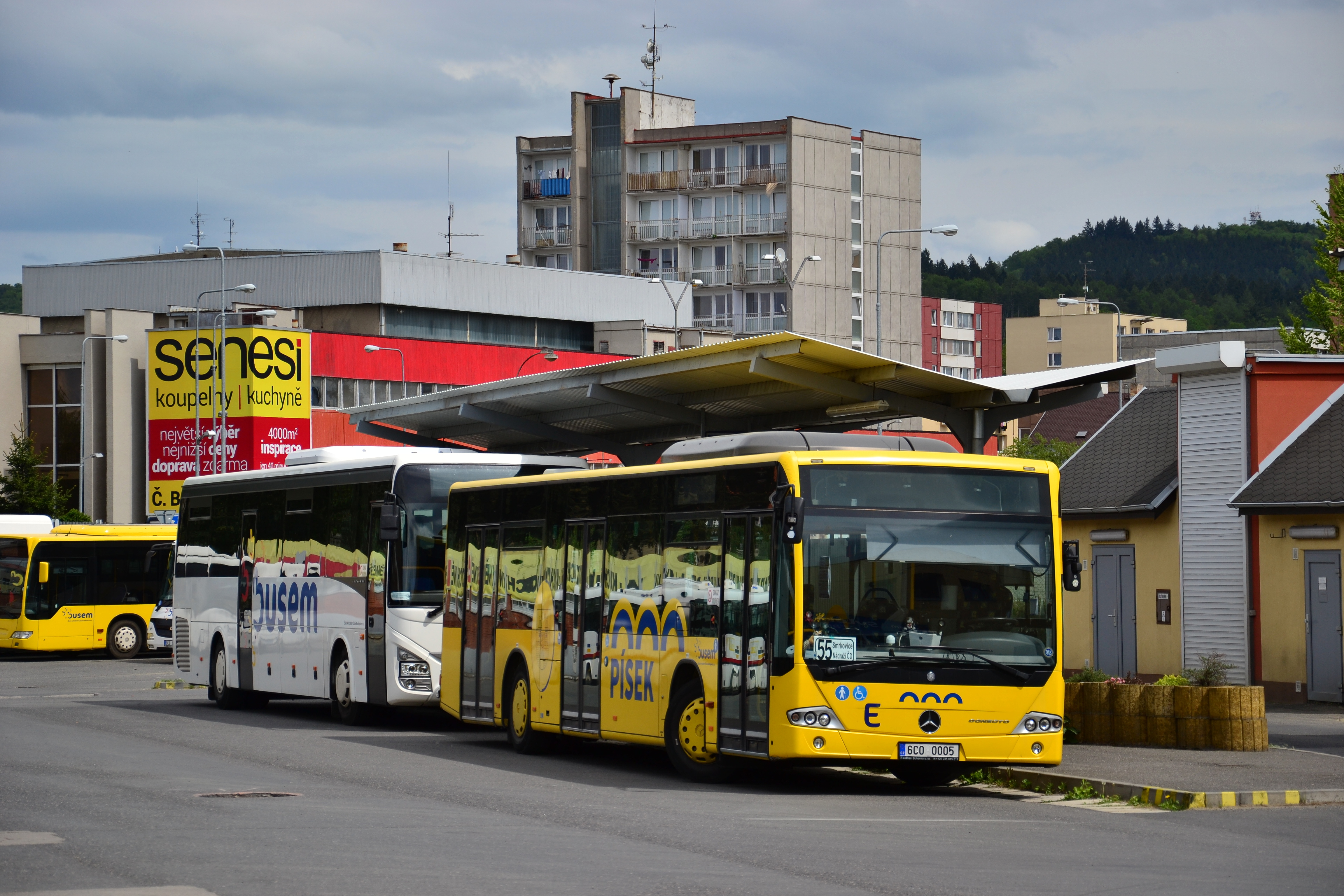 Vozy jezdící v rámci MHD Písek jsou všechny ve žlutém nátěru a jejich označení vzhledem k jejich počtu není pomocí evidenčních čísel, ale pomocí evidenčních písmen.